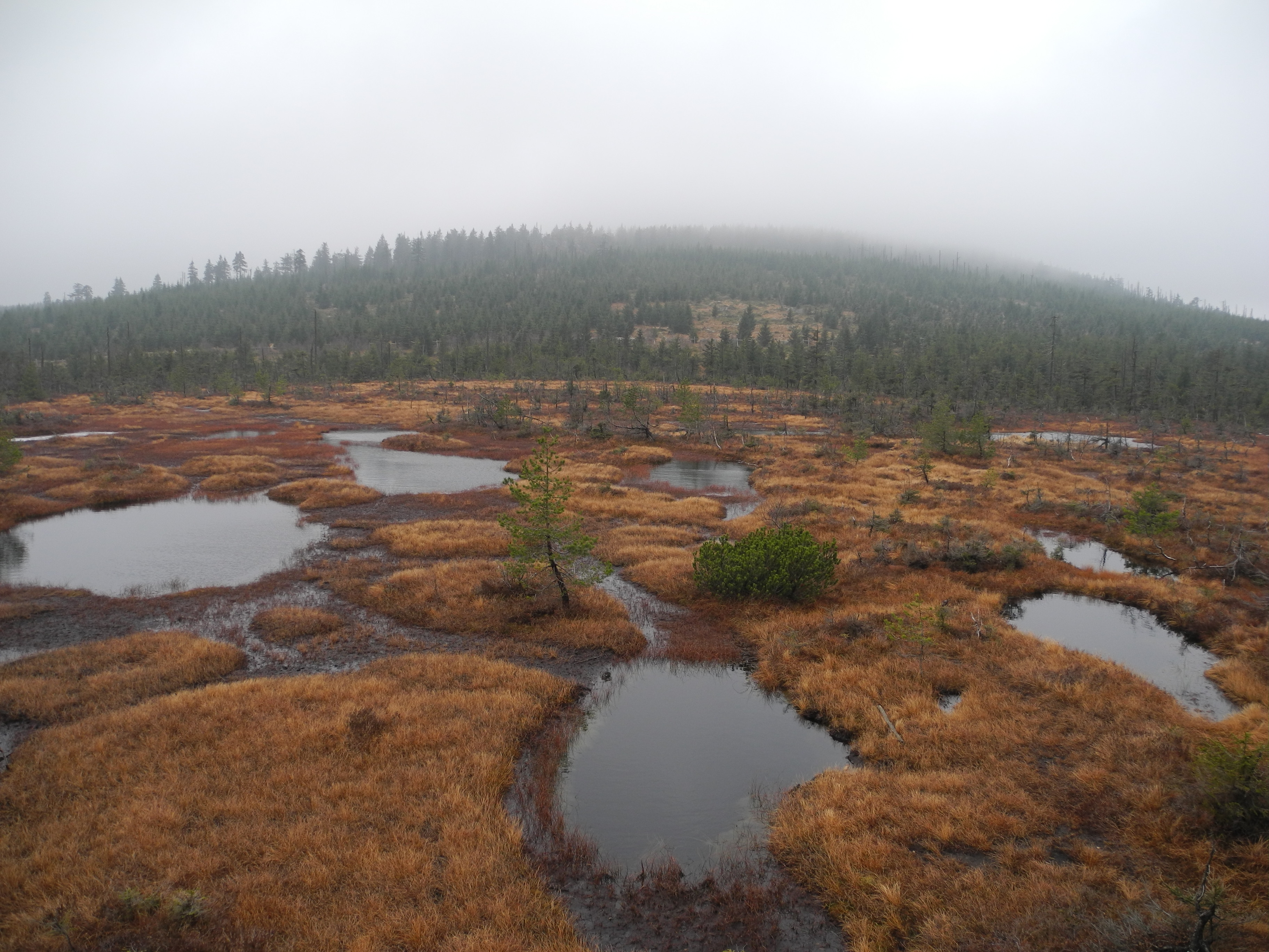 Jezírka rašelinná